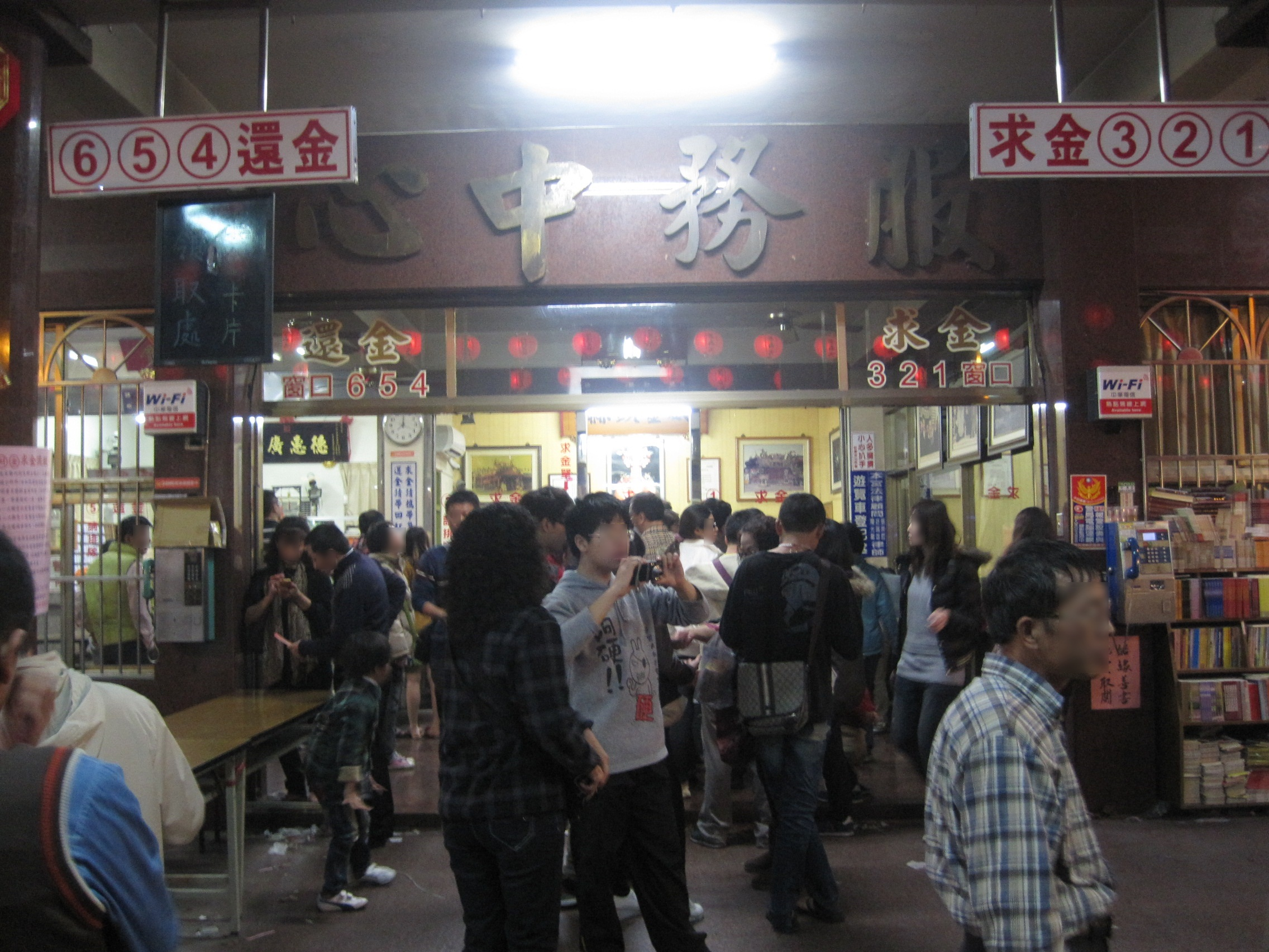 南投竹山社寮紫南宮借金